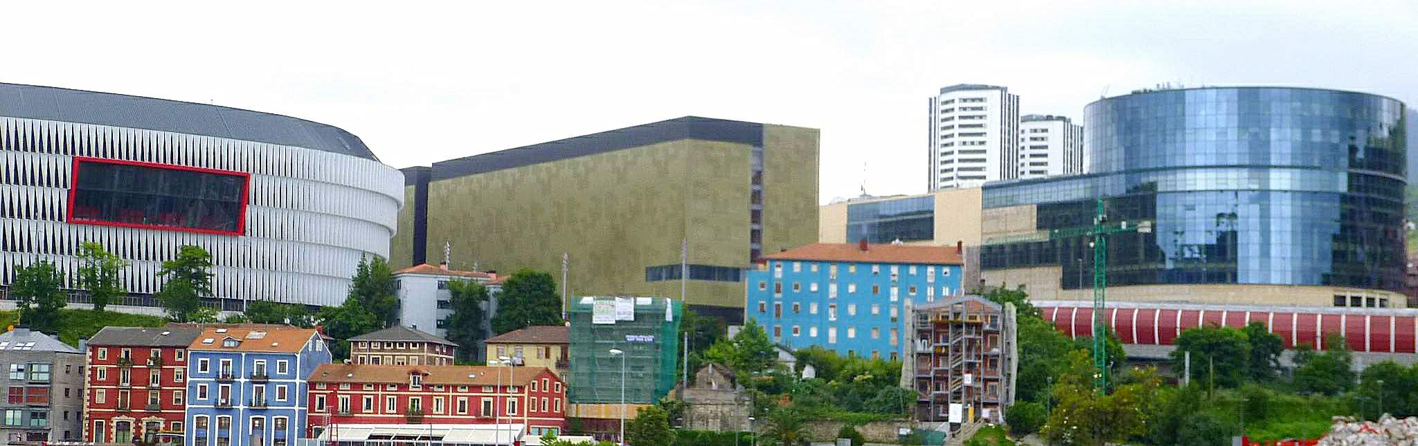 Panorámica arquitectónica del distrito Basurtu-Zorrotza desde el Puente Frank Gehry. De izquierda a derecha: Nuevo Estadio San Mamés, Edificio EUITI y Minas (UPV/EHU), Torres de Garellano (Dorre Barriak) y Edificio Bami, sede de EiTB